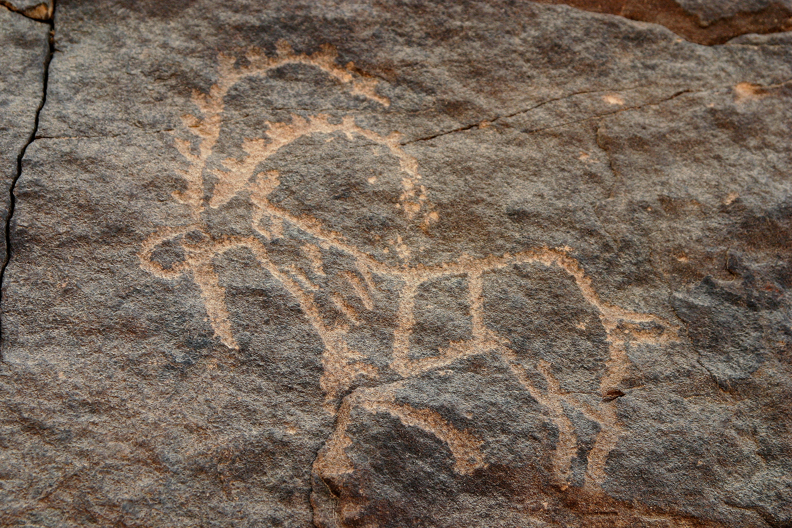 Petroglyph at Bir Hima in Saudi Arabia